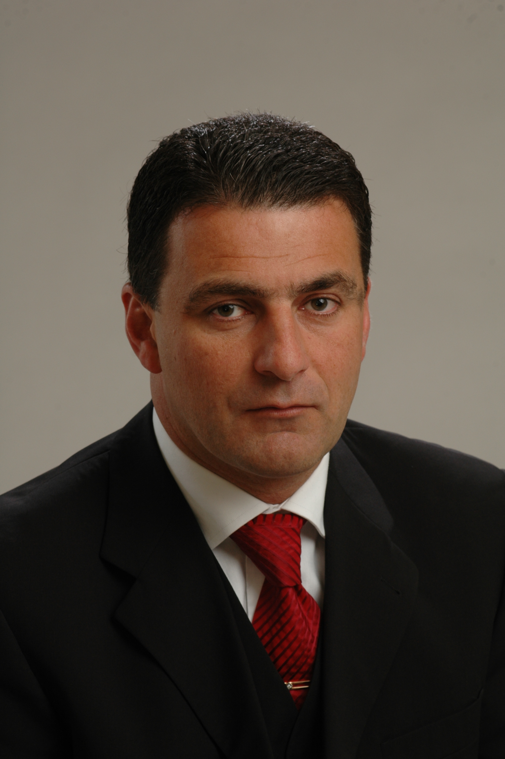 Foto: Saeima